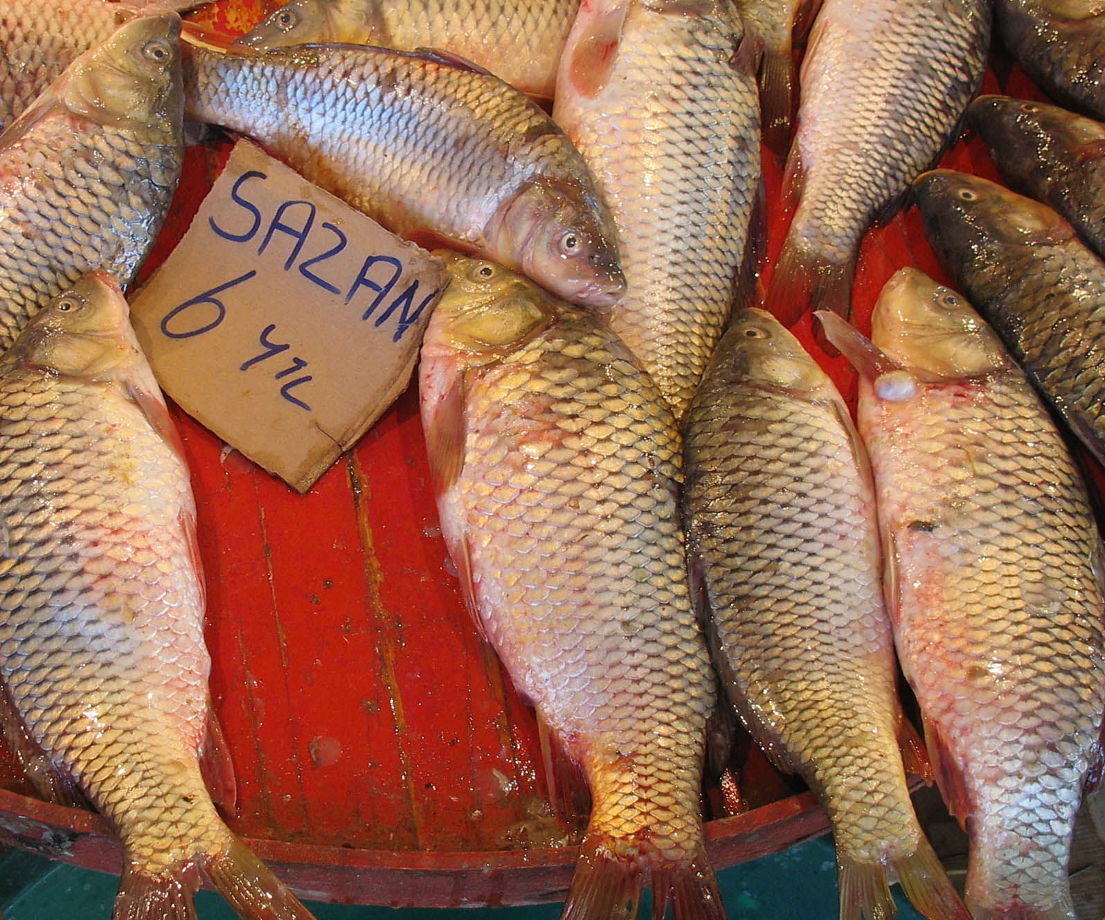 Sazan balığı